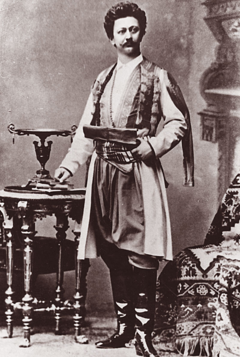 Srpski (latinica): Laza Kostić u crnogorskoj nošnji